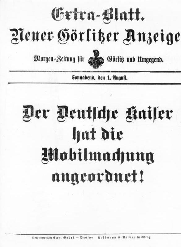 Mobilmachung, Extrablatt Zentralbild/dpa 28.7.1954 I. Weltkrieg 1914 - 1918 Zum Kriegsausbruch am 1. August 1914 UBz: Der Auszug deutscher Soldaten aus ihrer Garnisonsstadt [Abbildung „Extra-Blatt Neuer Görlitzer Anzeiger, Sonnabend den 1. August Der Deutsche Kaiser hat die Mobilmachung angeordnet!“]